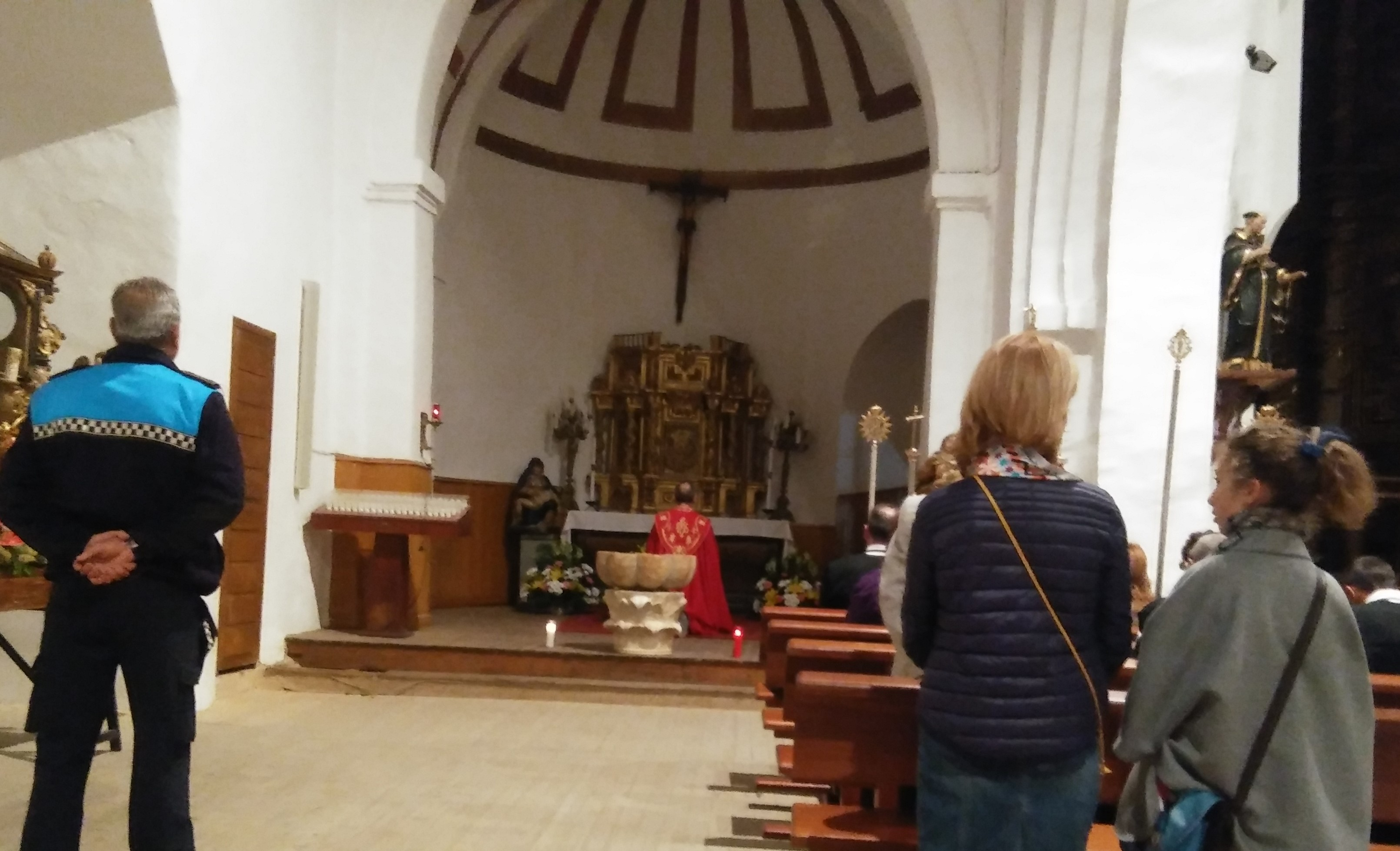 Deposito de varas de mando